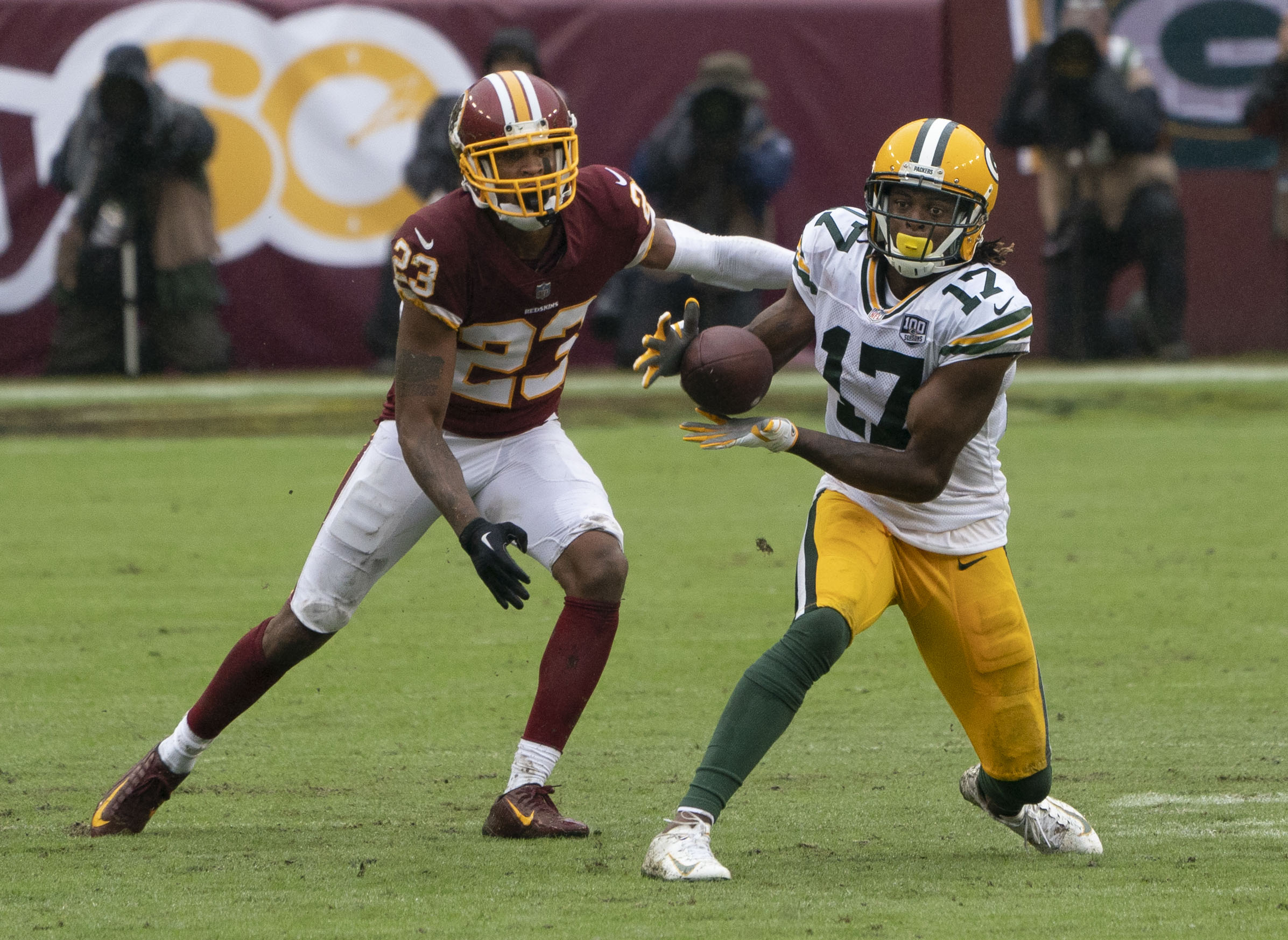 Packers at Redskins 09/23/18